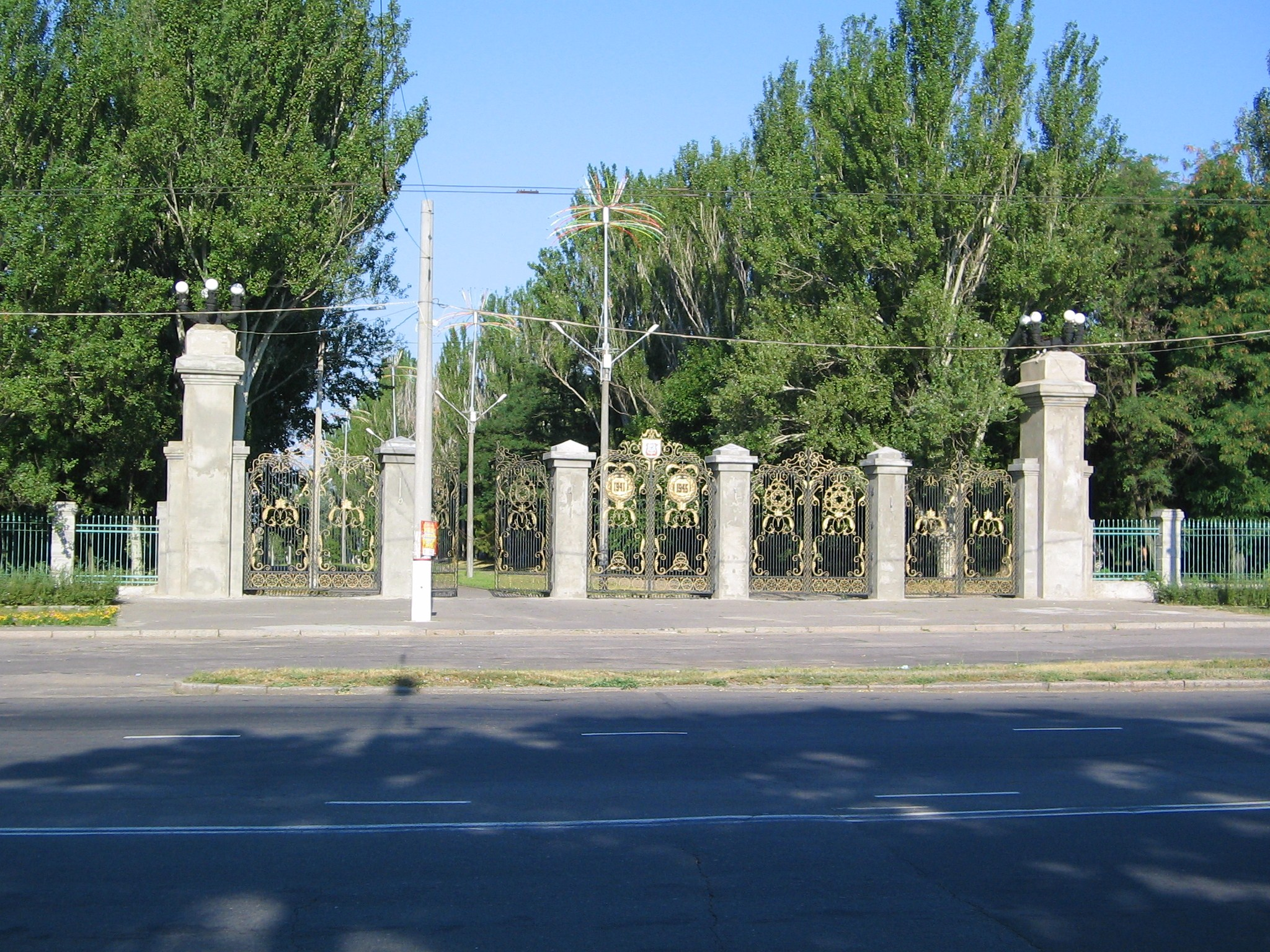 Ворота парка Победы (Николаев)